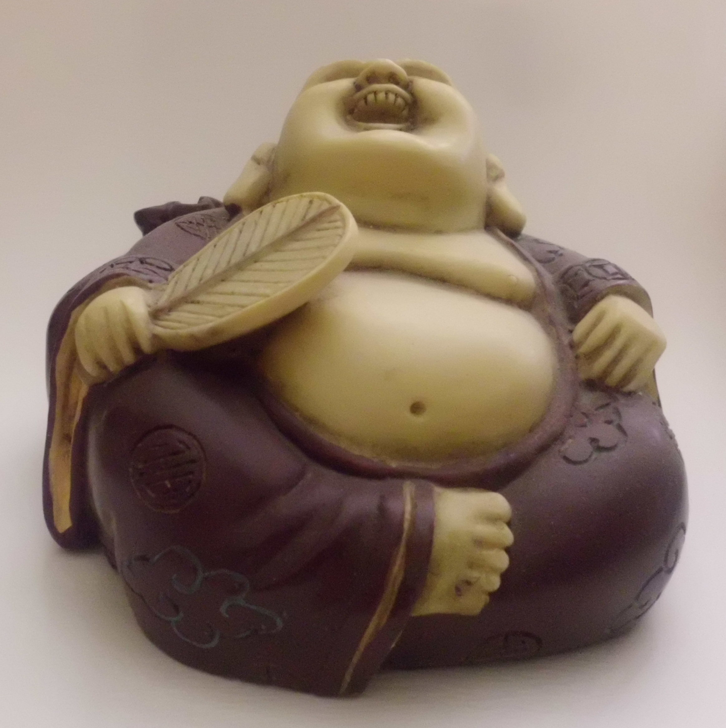 Fotografía de un "Buda gordo" que he tomado con mi cámara digital CASIO EXILIM (14.1 MP 26 mm) la mañana del 13 de enero de 2017. Posteriormente, la he recortado con Picasa 3.